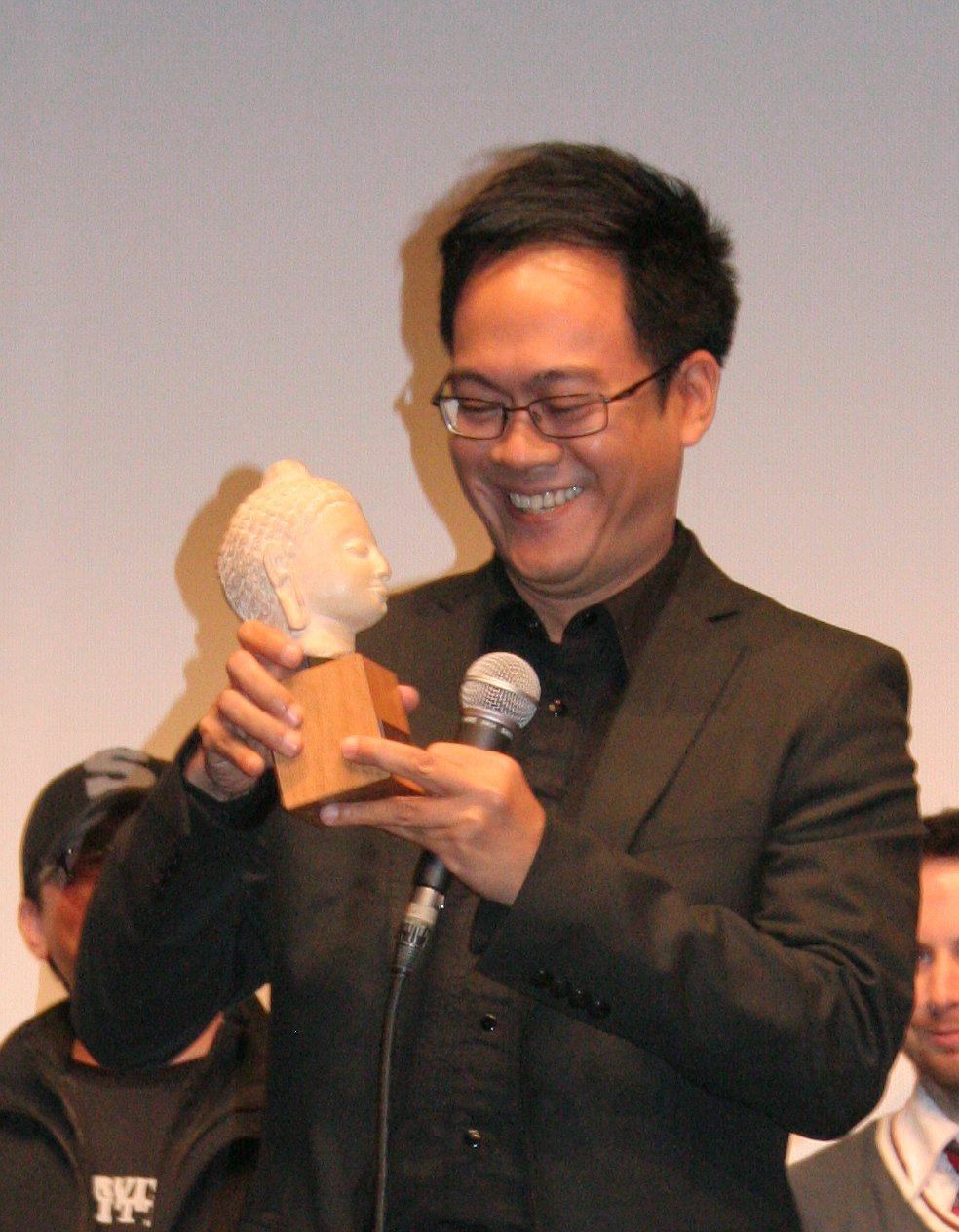 Le réalisateur et scénariste philippin Chris Martinez au festival international des cinémas d'Asie recevant le prix Guimet pour son film "100".